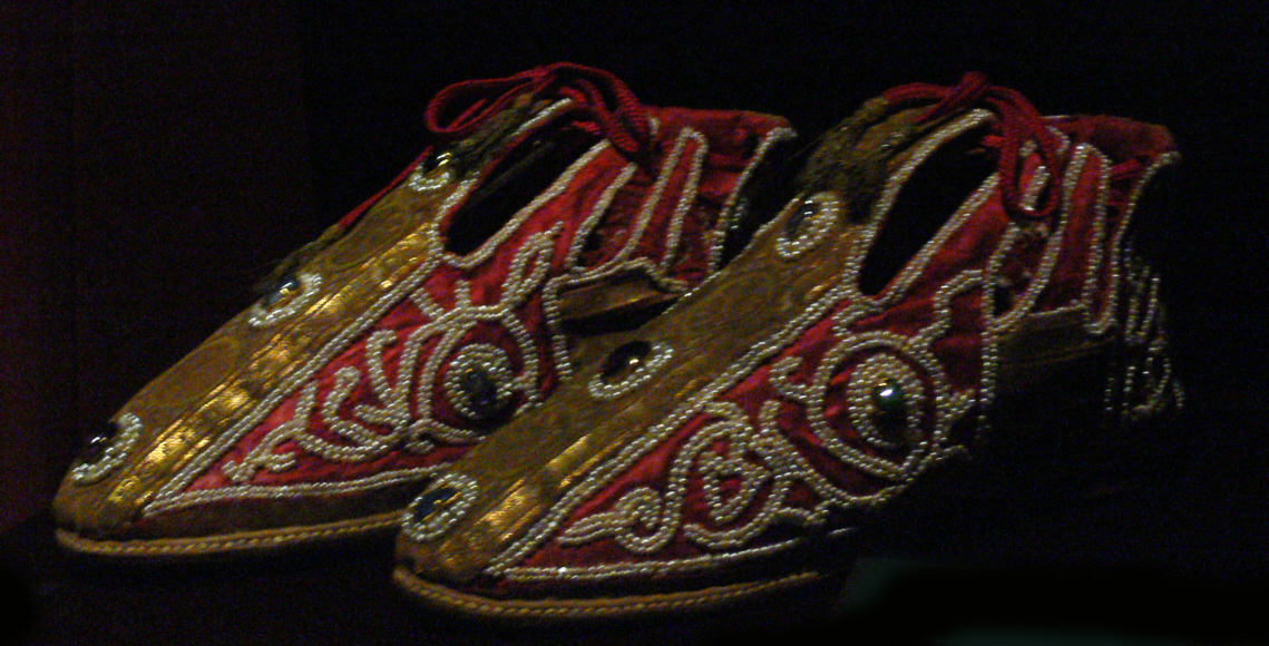 Schuhe (Sandalia), Sizilien, 12. Jh.; Reichskleinodien, Weltliche Schatzkammer, Wien